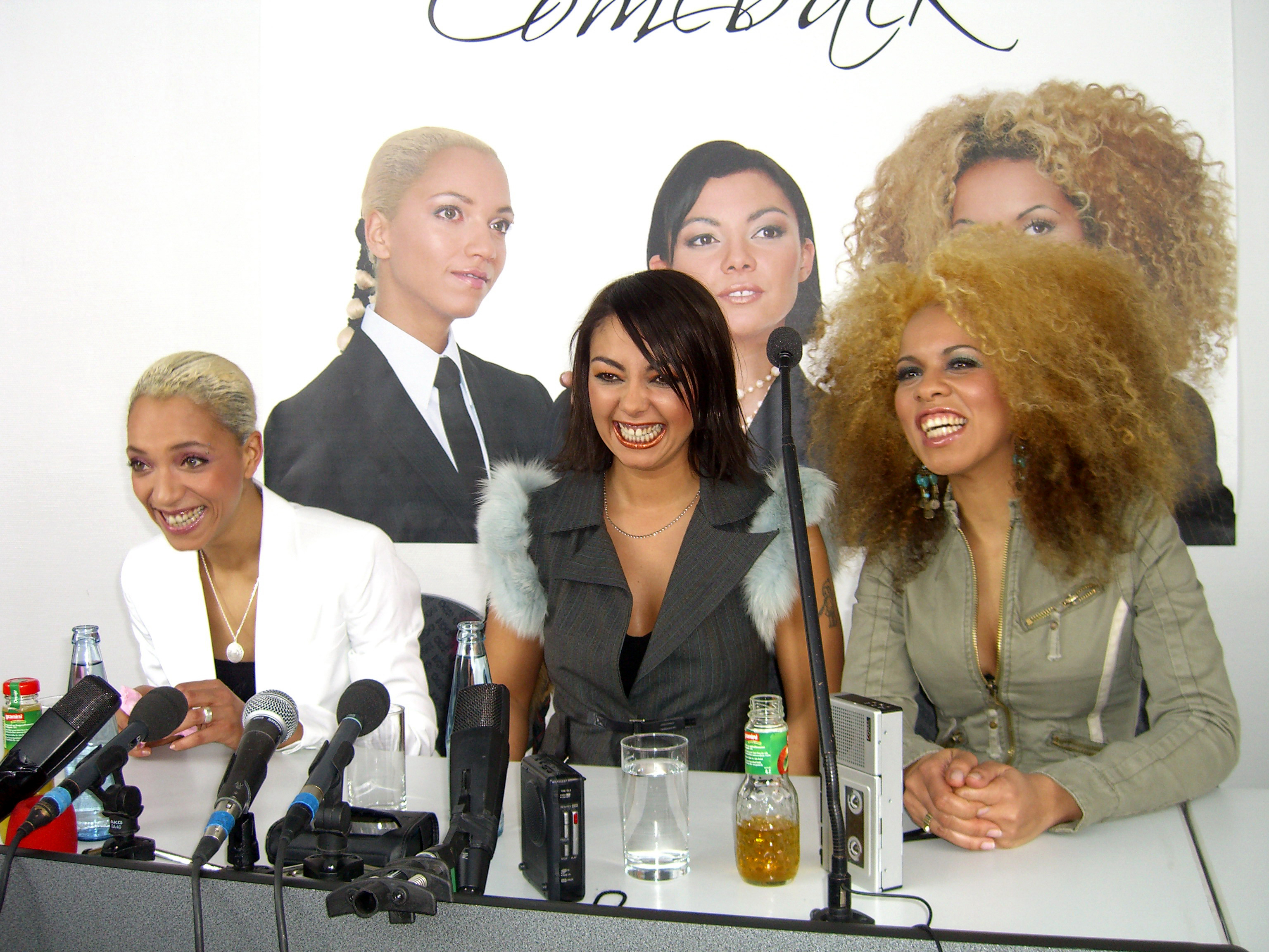 Tic Tac Toe beim Videodreh zu "Warum"